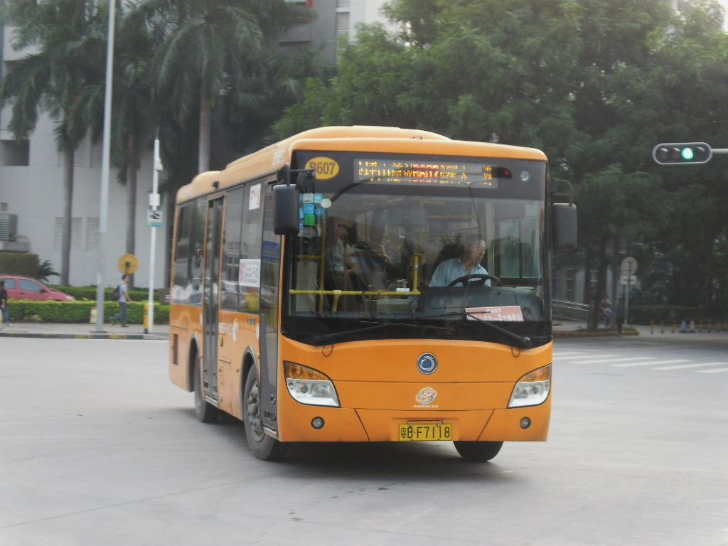 中文（香港）: 深圳公交B607路